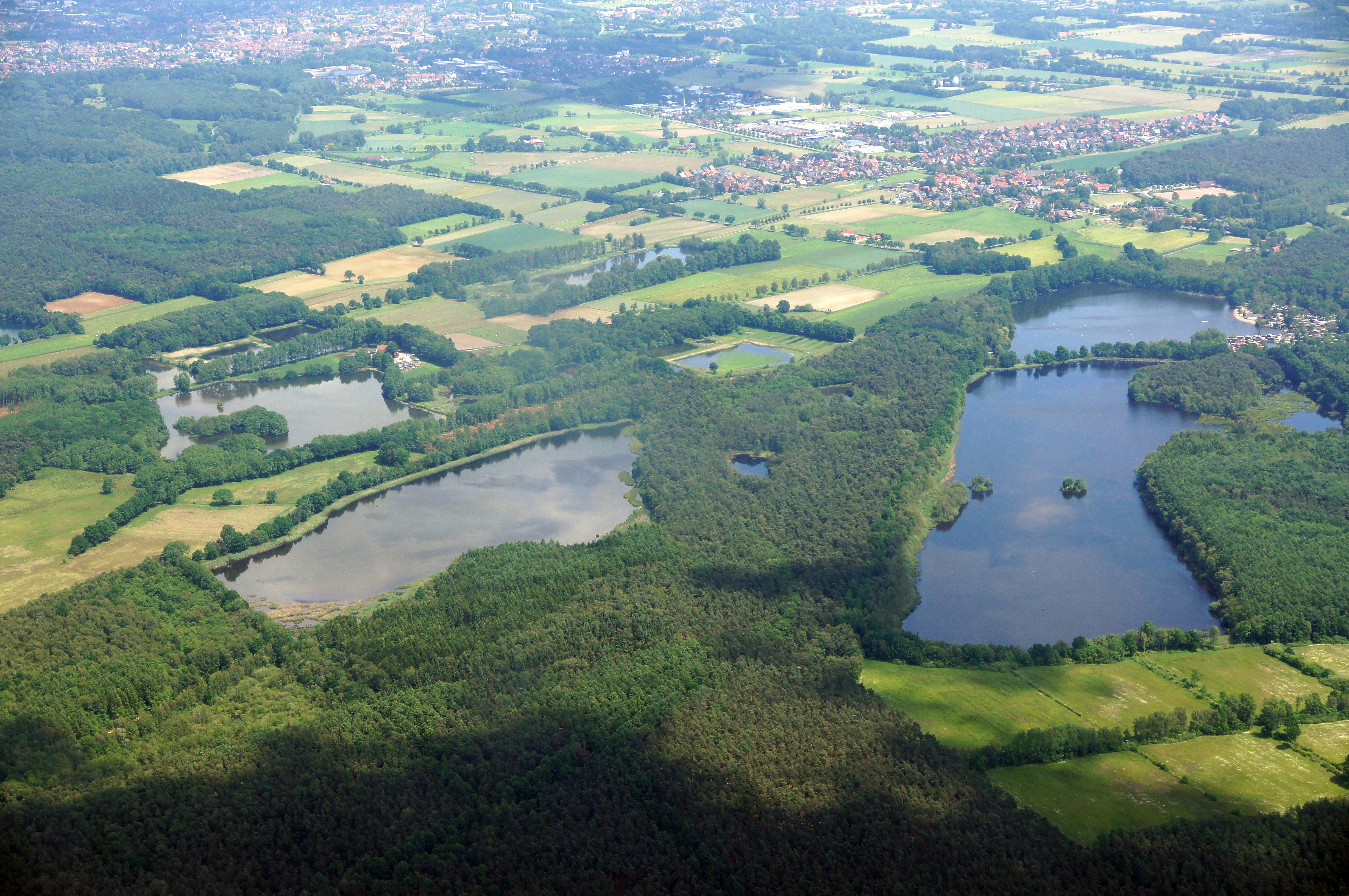 Teiche in der Heubachniederung in Dülmen, Kreis Coesfeld und Haltern ,Kreis Recklinghausen, NRW. Das Bild entstand während des Münsterland-Fotoflugs am 1. Juni 2014. Hinweis: Die Aufnahme wurde aus dem Flugzeug durch eine Glasscheibe hindurch fotografiert.